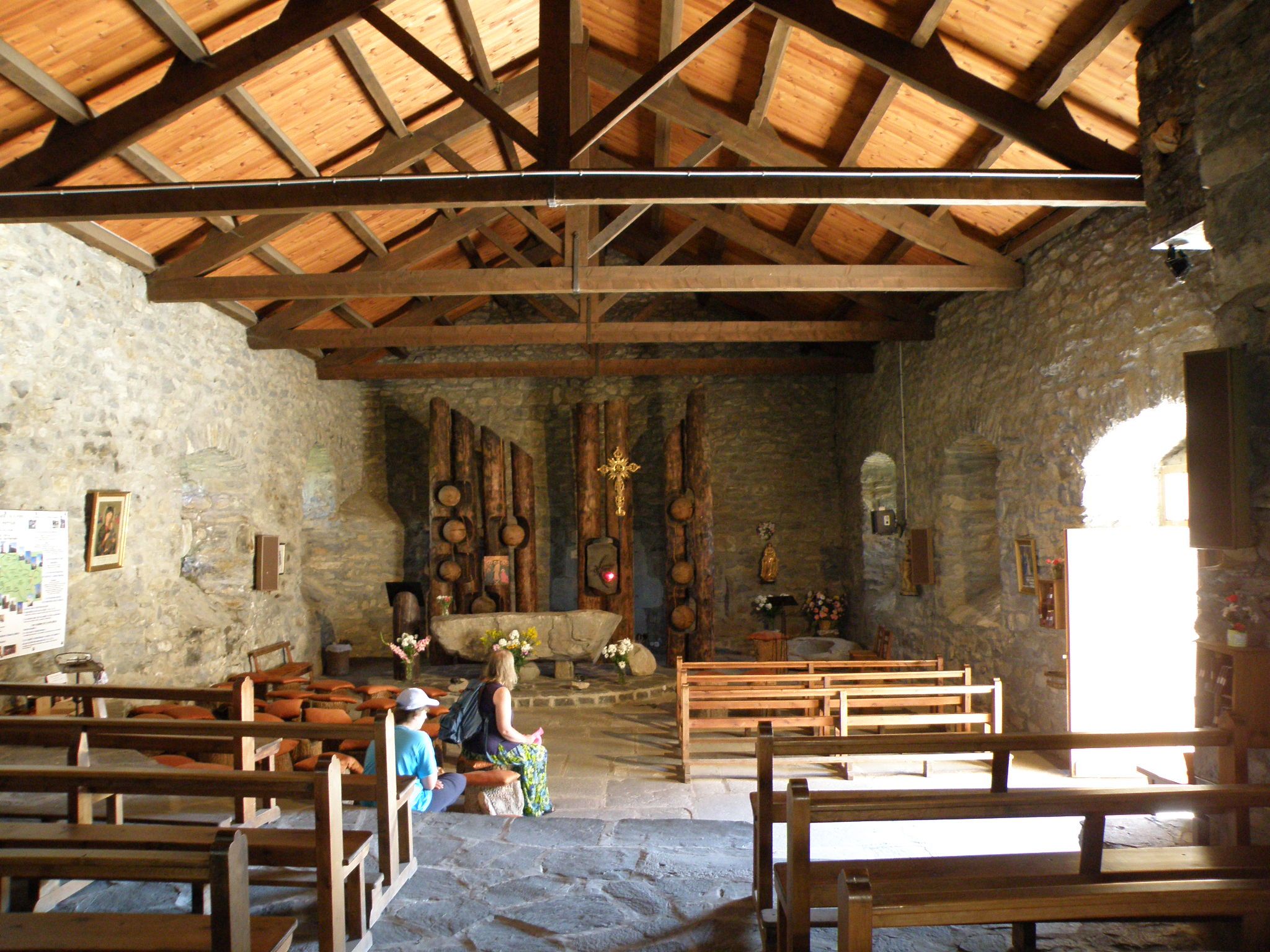 Champclause, comm. de la Haute-Loire, France (Auvergne). Village de Boussoulet : intérieur de l'église.